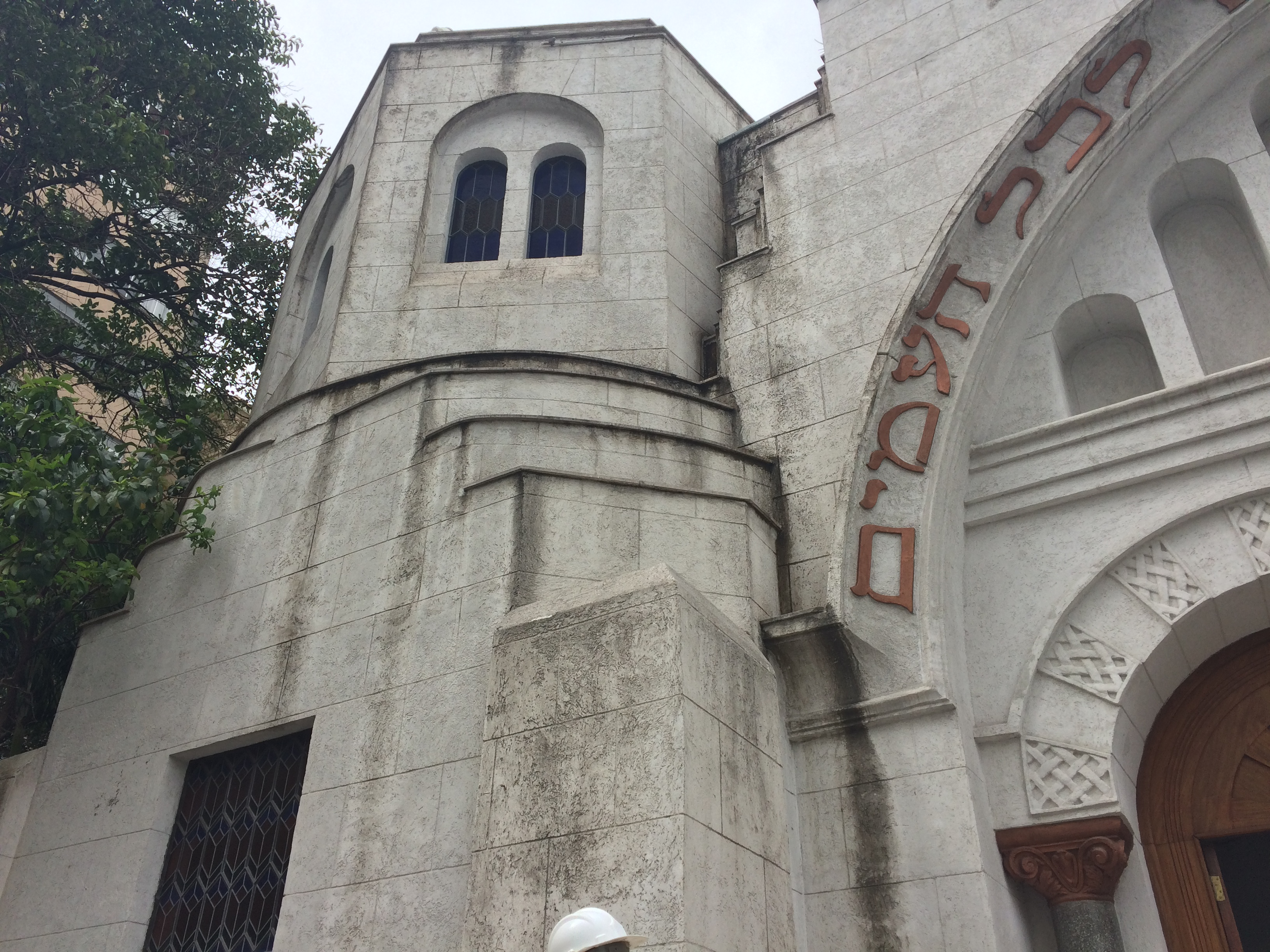 Entrada Principal do Museu Judaico de São Paulo em obras, São Paulo (SP), Brasil